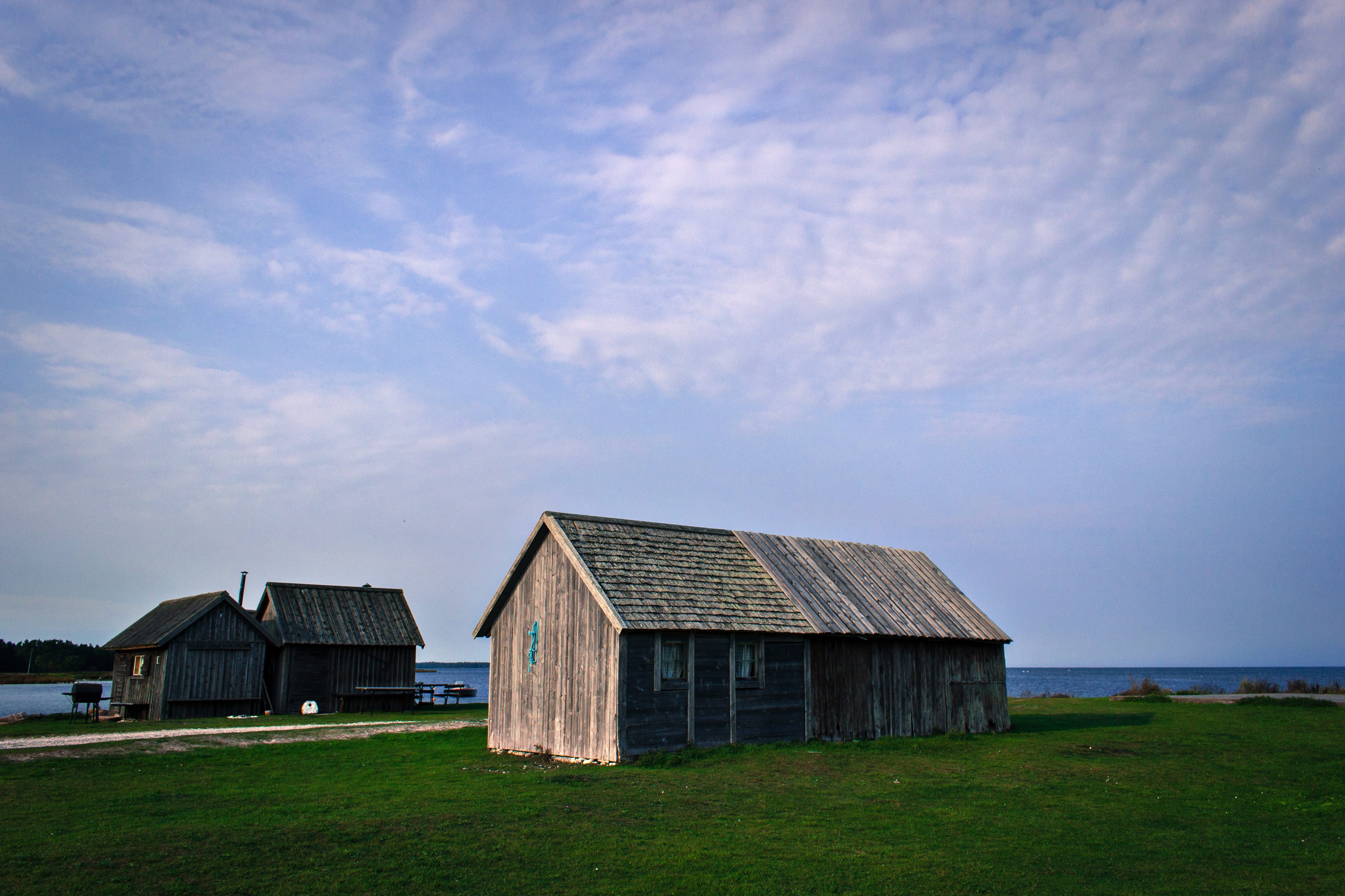 Estación pesqueira de Baju, na illa sueca de Gotland.